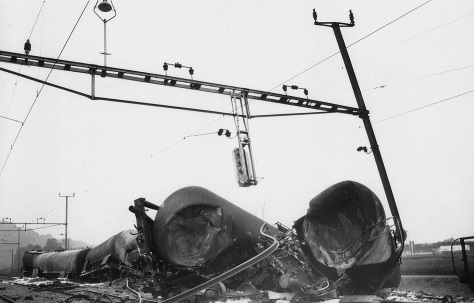 Ausgebrannte Zisternenwagen nach dem Zugsunglück beim Bahnhof Au am 19. September 1988.